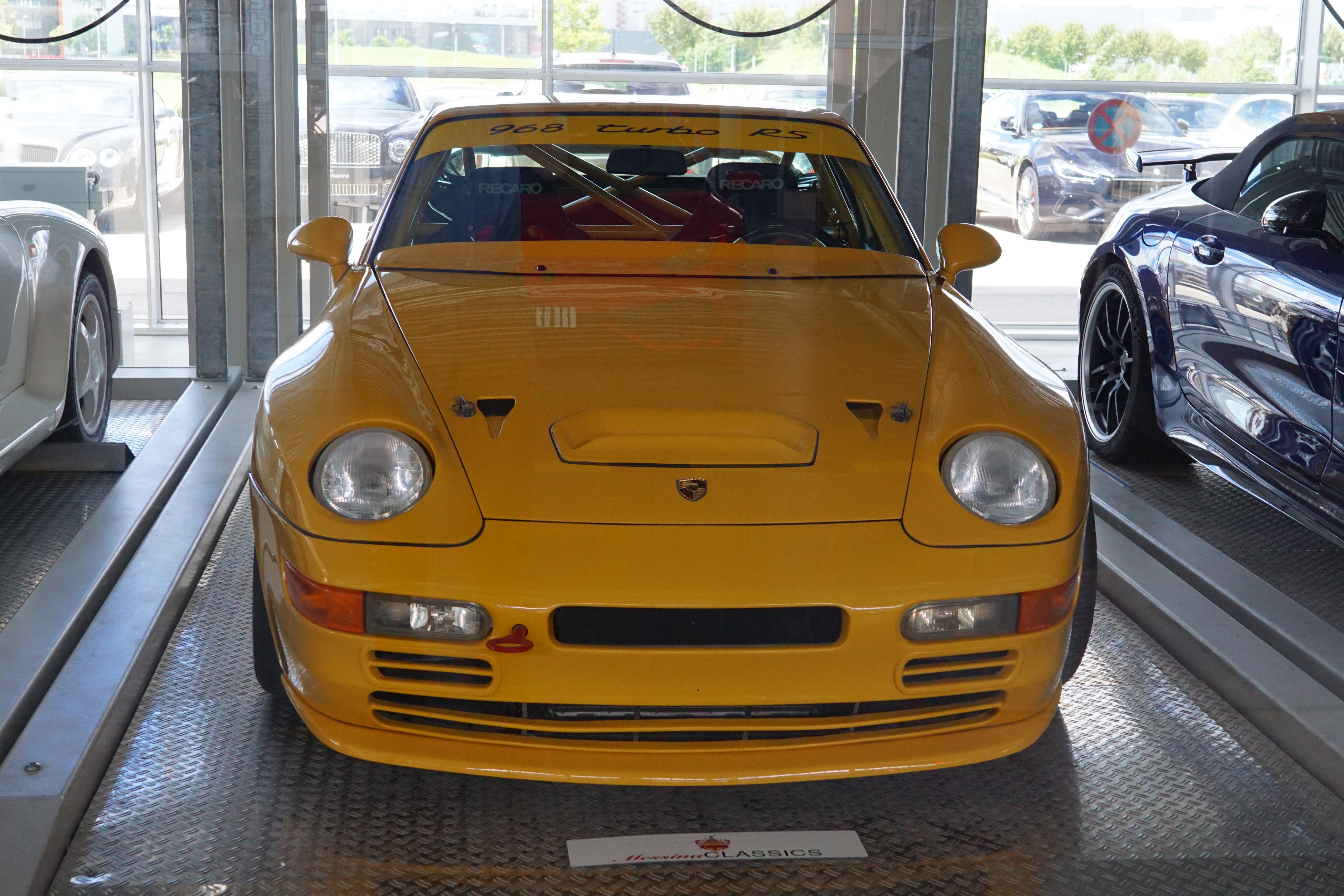 Porsche 968 Turbo RS, eines von nur vier gebauten Exemplaren, das einzige mit Straßenzulassung, Motorworld Region Stuttgart auf dem Flugfeld in Böblingen.